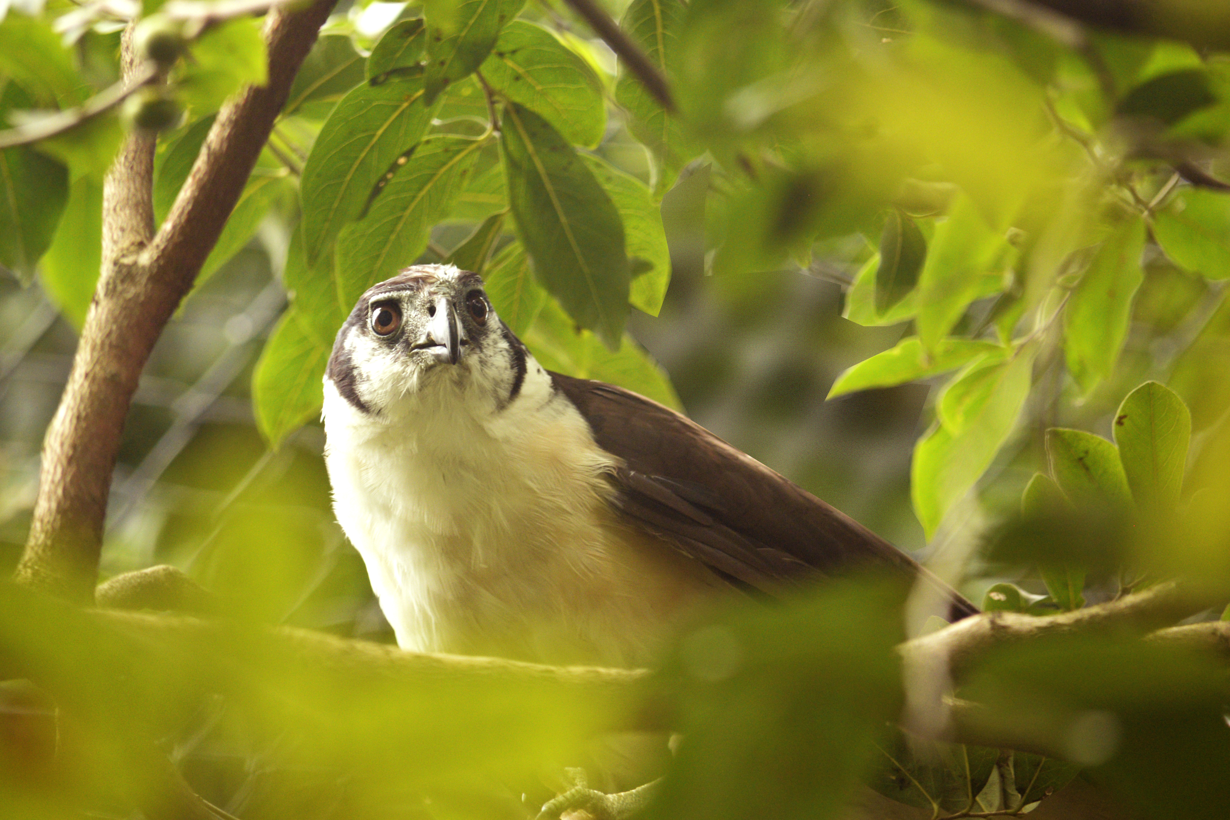 El halcón montés de collarejo mide de 51 a 58,5 cm de longitud, con una envergadura alar de 76 - 94 cm.3 El plumaje es muy variable entre individuos. Sus partes superiores suelen ser de color gris oscuro o negro, mientras que sus partes inferiores son blancas o crema pálido, con o sin franjas oscuras horizontales. Presentan una banda blanca alrededor del cuello y su larga cola también presenta cuatro franjas blancas transversales. Chiapas, Mexico.